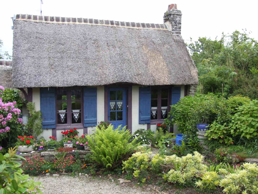 Photo prise par moi-même en mai 2006